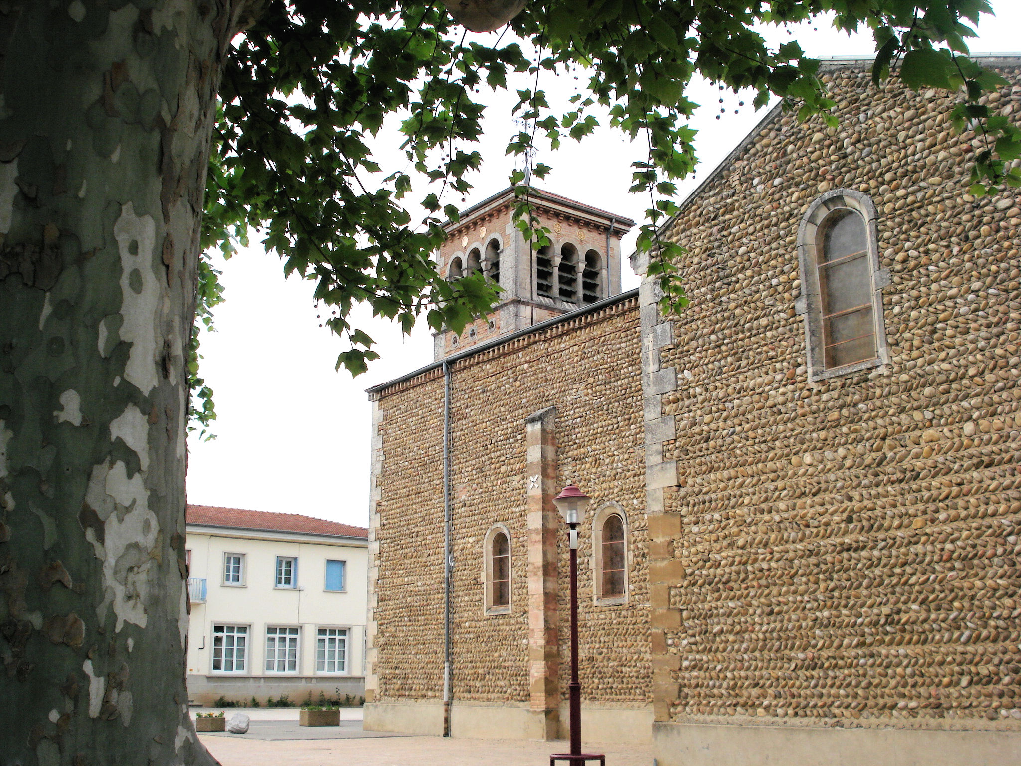 église de Lapeyrouse-Mornay dans la Drôme